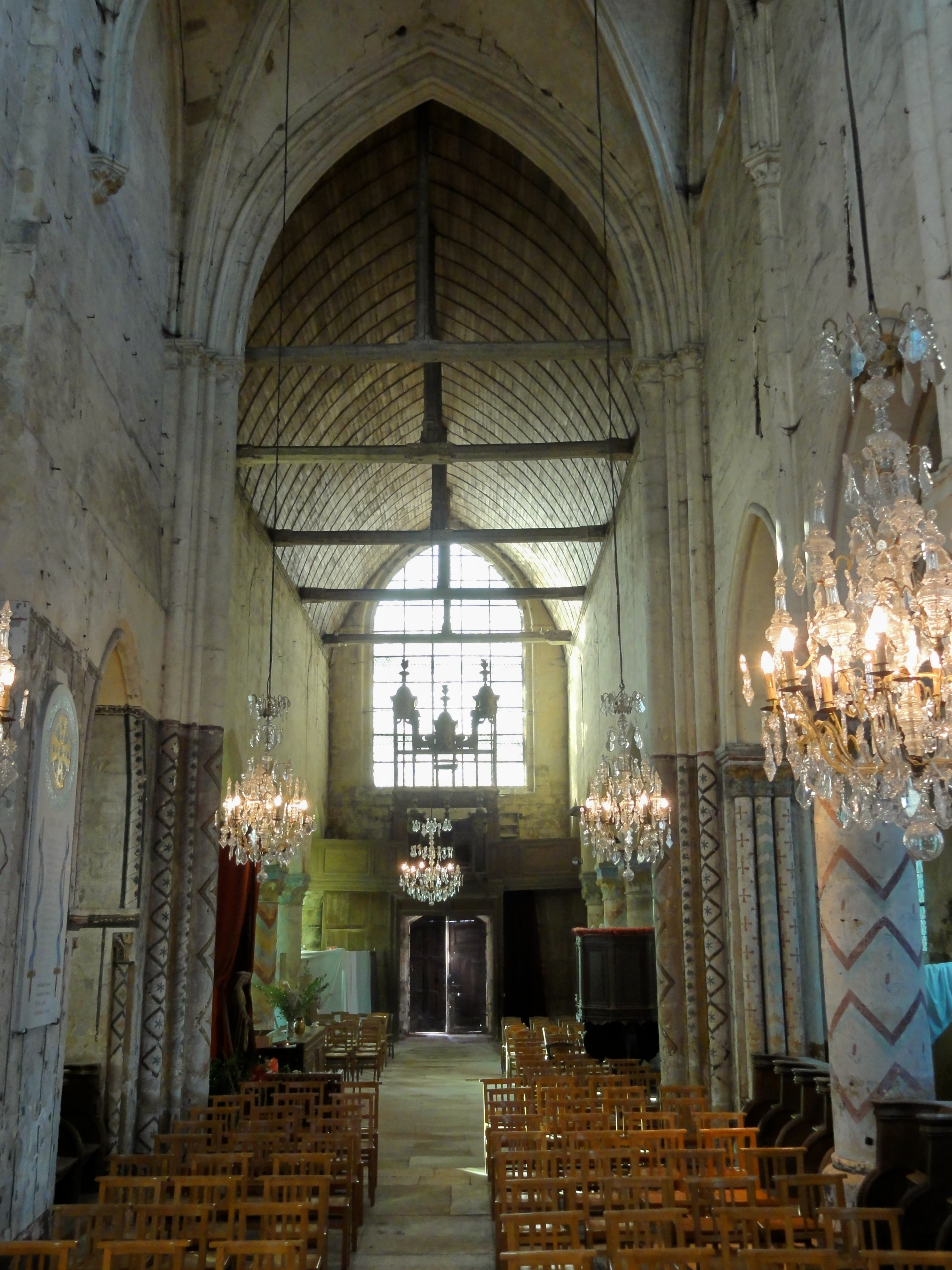 Intérieur, vue en direction du portail.